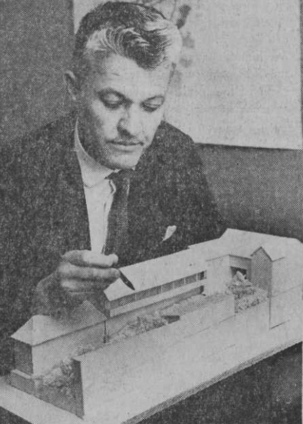 Stadsarkitekt Bengt Emanuelson med modell av Oxenstiernska kvarteret i Arboga. Restaureringsförslag av teknolog Jan Seth som del i examensarbete på KTH